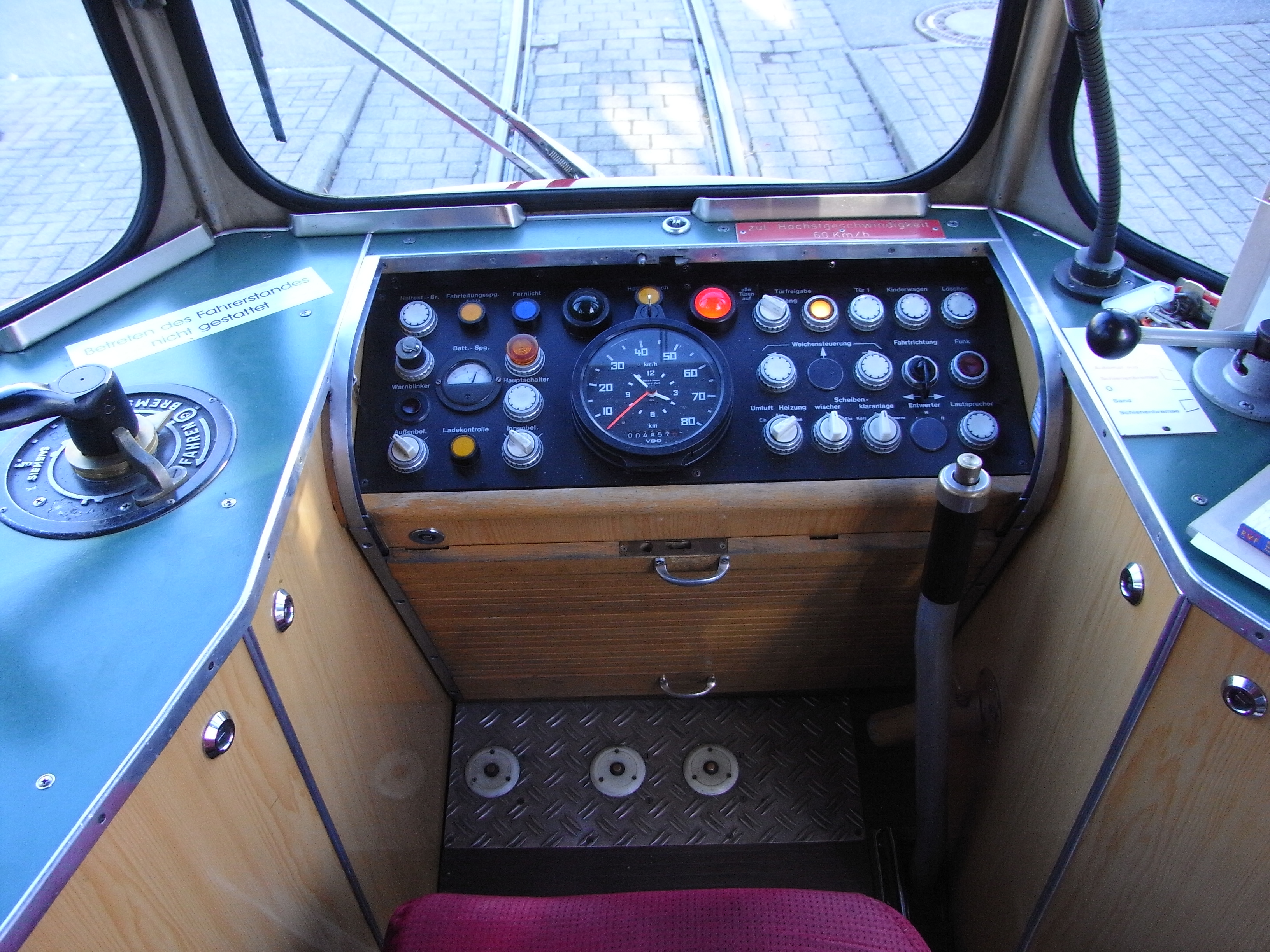 Die Bilder sind in Freiburg i. Br. bei einer Sonderfahrt des GT-4 aufgenommen worden Fahrstand